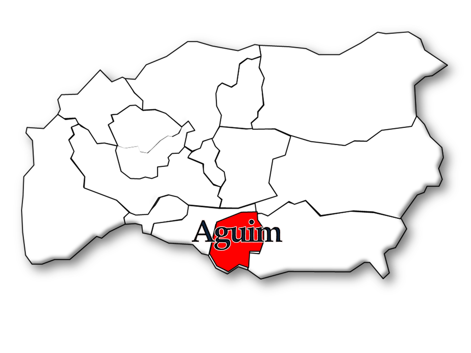 Freguesia